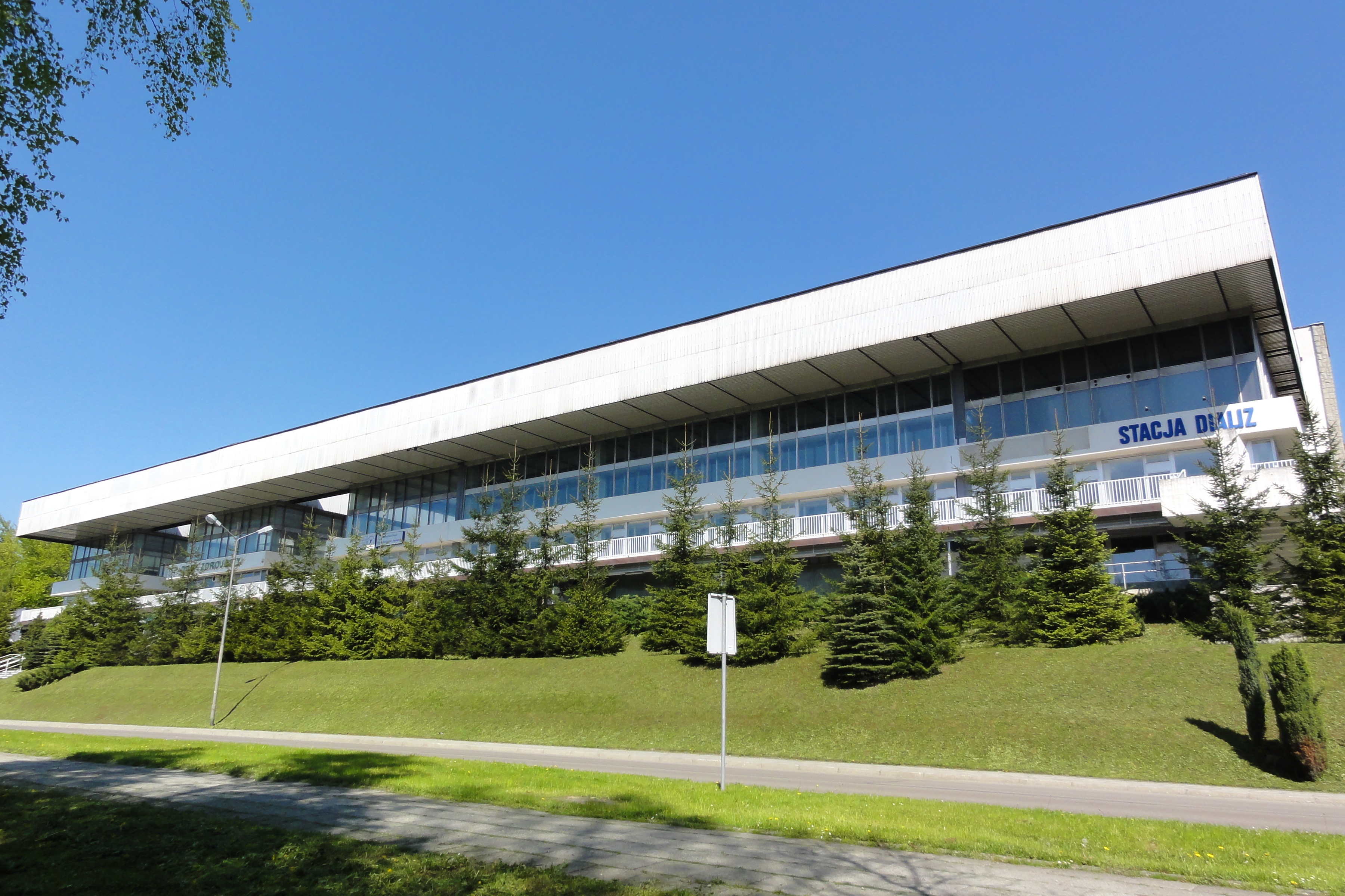 Dom Zdrojowy w Ustroniu-Zawodziu, kiedyś mieścił też kino